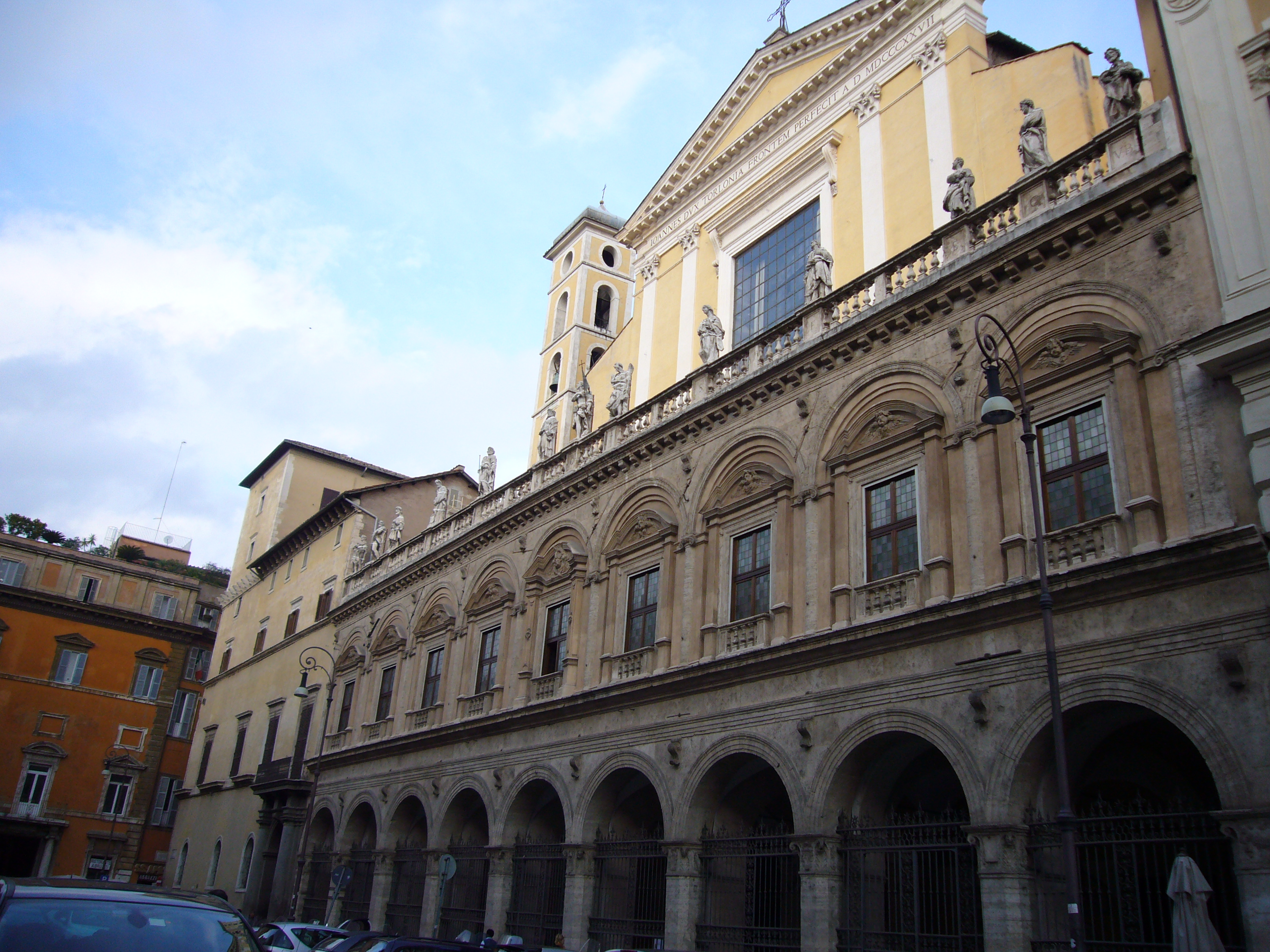 Roma, Basilica dei Santi Apostoli